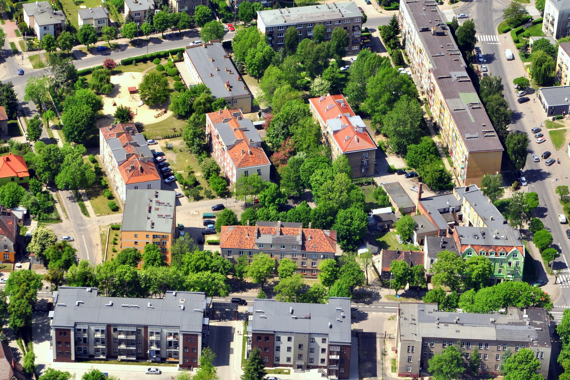 Majdan w Ostrowie Wlkp. Obecnie, na terenie byłego niemieckiego obozu pracy,znajdują się budynki mieszkalne wielorodzinne i przedszkole ( zabudowę rozpoczęto w połowie lat 50 XX w. )